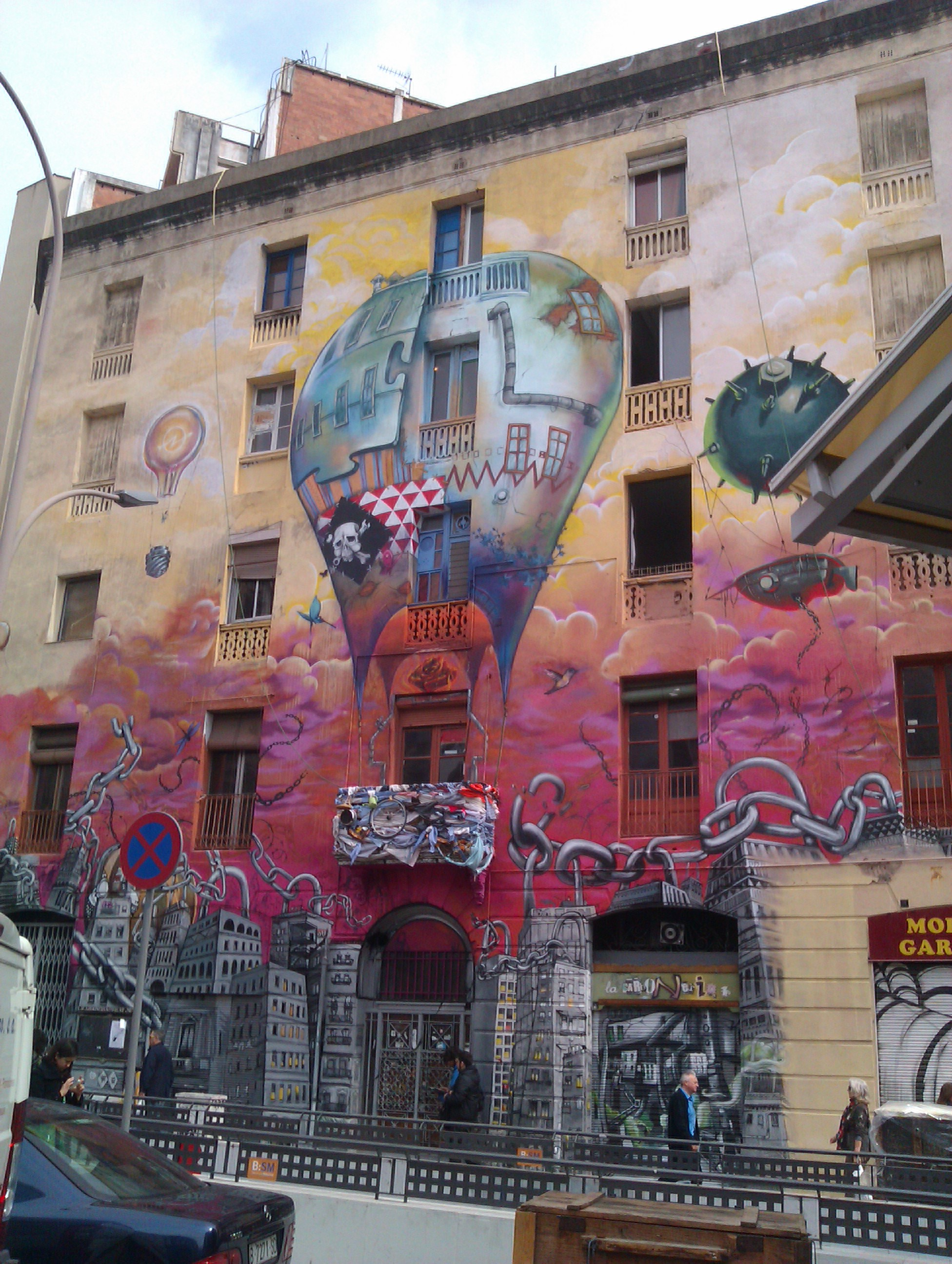 Façana del Centre Social Ocupat Autogestionat (CSOA) La Carboneria al Carrer Urgell de Barcelona. Març 2013